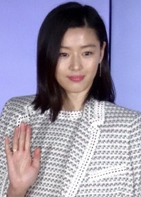 한샘 2015년도 S/S 신혼 라이프 스타일 쇼케이스